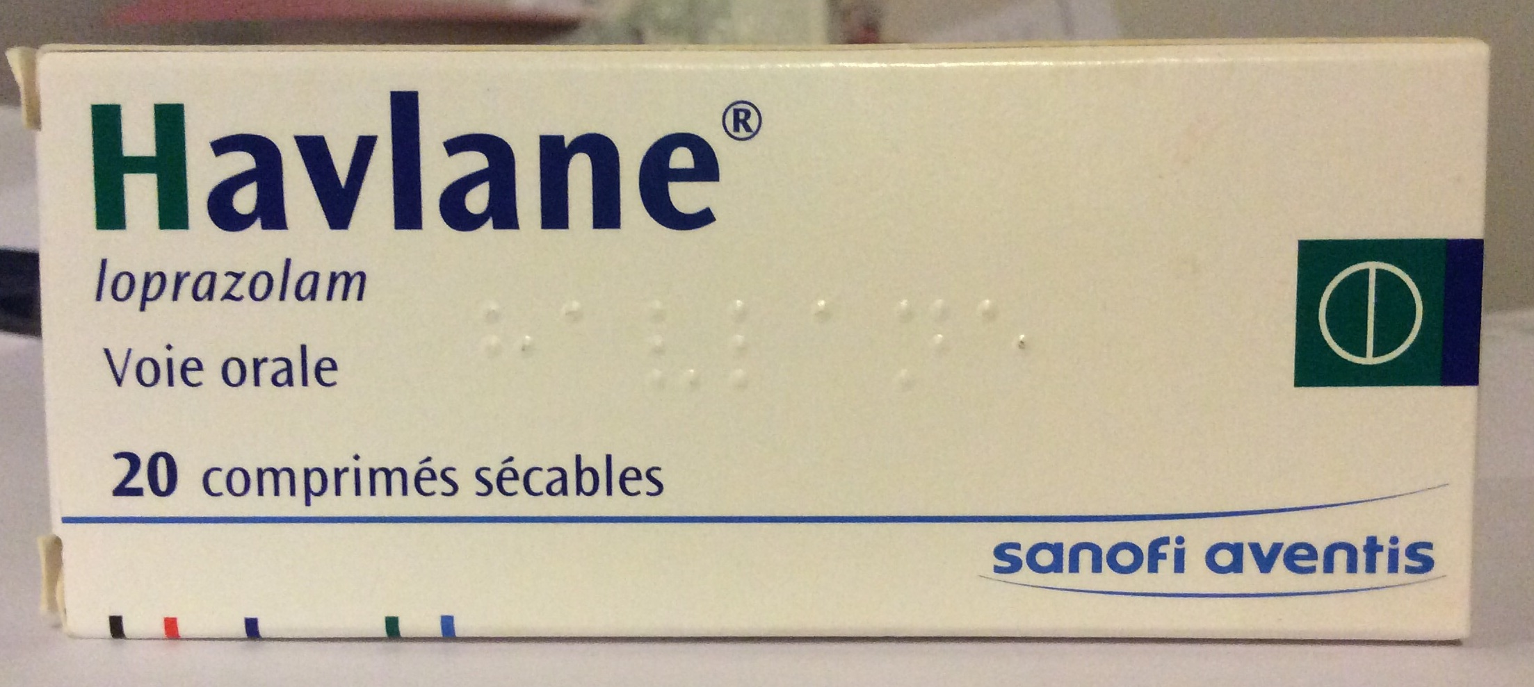 Boite de Havlane (Loprazolam)